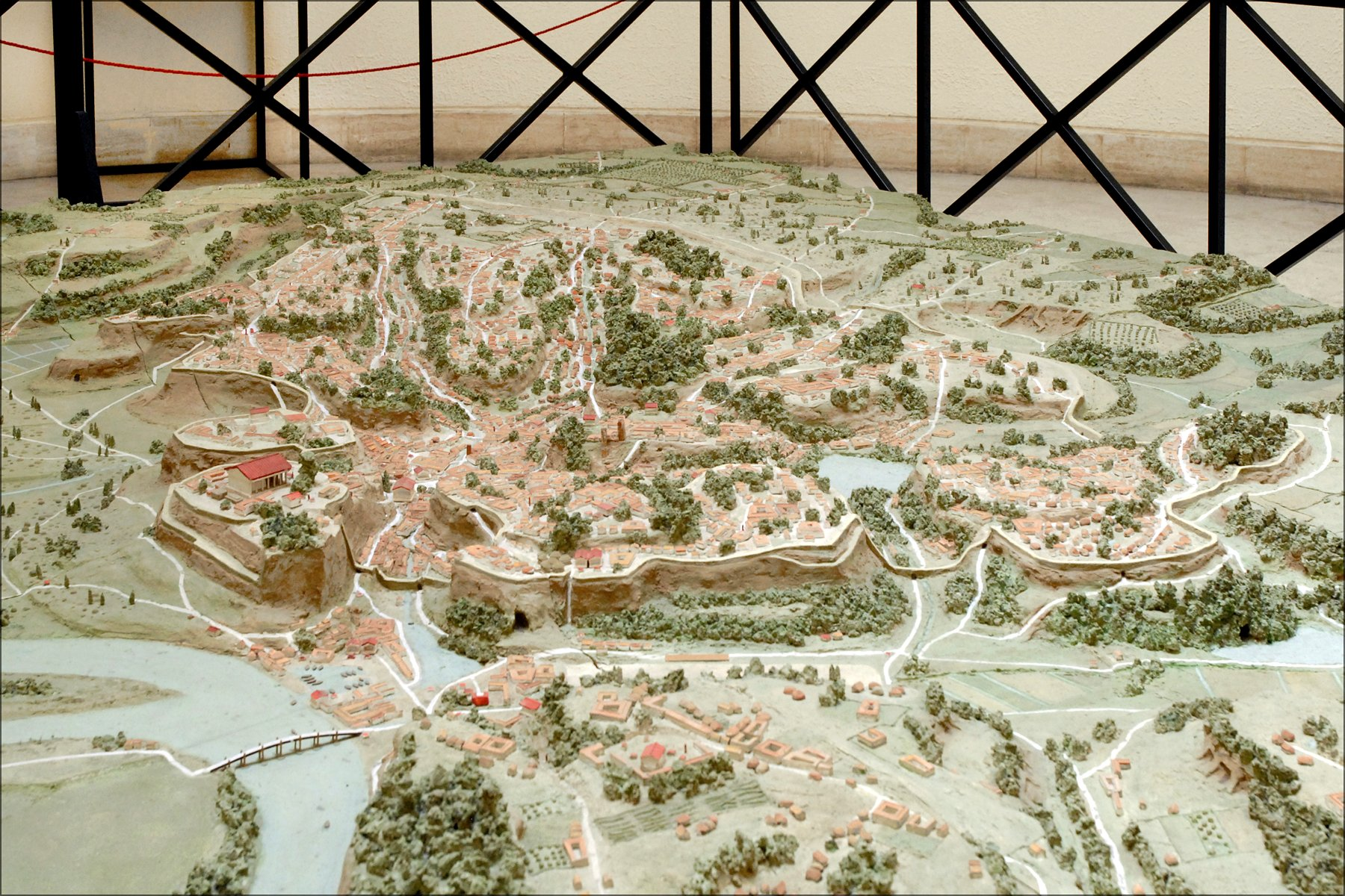 Maquette de Rome à l'époque archaïque (période entre la monarchie et la république) Au premier plan, le premier pont de Rome (Pont Sublicus) sur le Tibre et qui est situé à l'emplacement de l'ancien gué. C'est probablement l'existence de ce gué qui est à l'origine de la situation géographique de Rome. La maquette, a été réalisée sur la base de l'analyse comparée des sources historiques et des découvertes archéologiques, elle est à l'échelle 1:1000. ______ Le Musée de la Civilisation Romaine, inauguré en 1955, illustre, dans ses 59 sections, tous les aspects de l'ancienne civilisation romaine à travers une vaste collection de moulages d'après les originaux, conservés dans tous les Musées du monde, mais qui sont aujourd'hui détruits ou endommagés, et à travers des maquettes reproduisant les monuments éparpillés sur toute la superficie de l'Empire romain. Le premier noyau des collections remonte à l'exposition archéologique organisée en 1911 dans le cadre des manifestations pour le cinquantenaire de l'unification d'Italie. Les 14 premières sections représentent une synthèse historique de Rome, des origines au VI siècle. Le restant des 45 sections est dédié aux aspects de la vie publique, religieuse, économique, militaire ainsi que privée. Les deux points forts du musée sont : - la grande maquette qui reproduit la ville de Rome à l'époque de l'Empereur Constantin, - les moulages de la Colonne Trajane